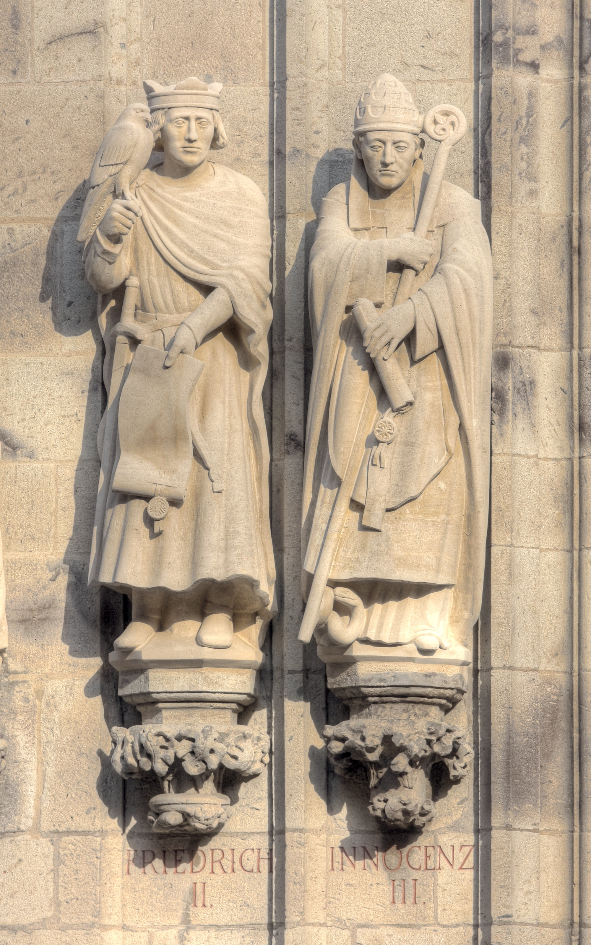 Rathausturm Köln mit den Figuren des Kaisers Friedrich II. (HRR) und des Papstes Innocenz III. Details zu der Statue: Bildhauer der Friedrich-Statue: Karl Matthäus Winter Bildhauer der Innocenz-Statue: Karl Matthäus Winter Details zu der Konsole: Thema der Konsole unter der Friedrich-Statue: „Gummibaumkonsole“. Bildhauer: unbekannt, 1865 angefertigt Thema der Konsole unter der Innocenz-Statue: „Laubkonsole“. Bildhauer: Herbert Rausch